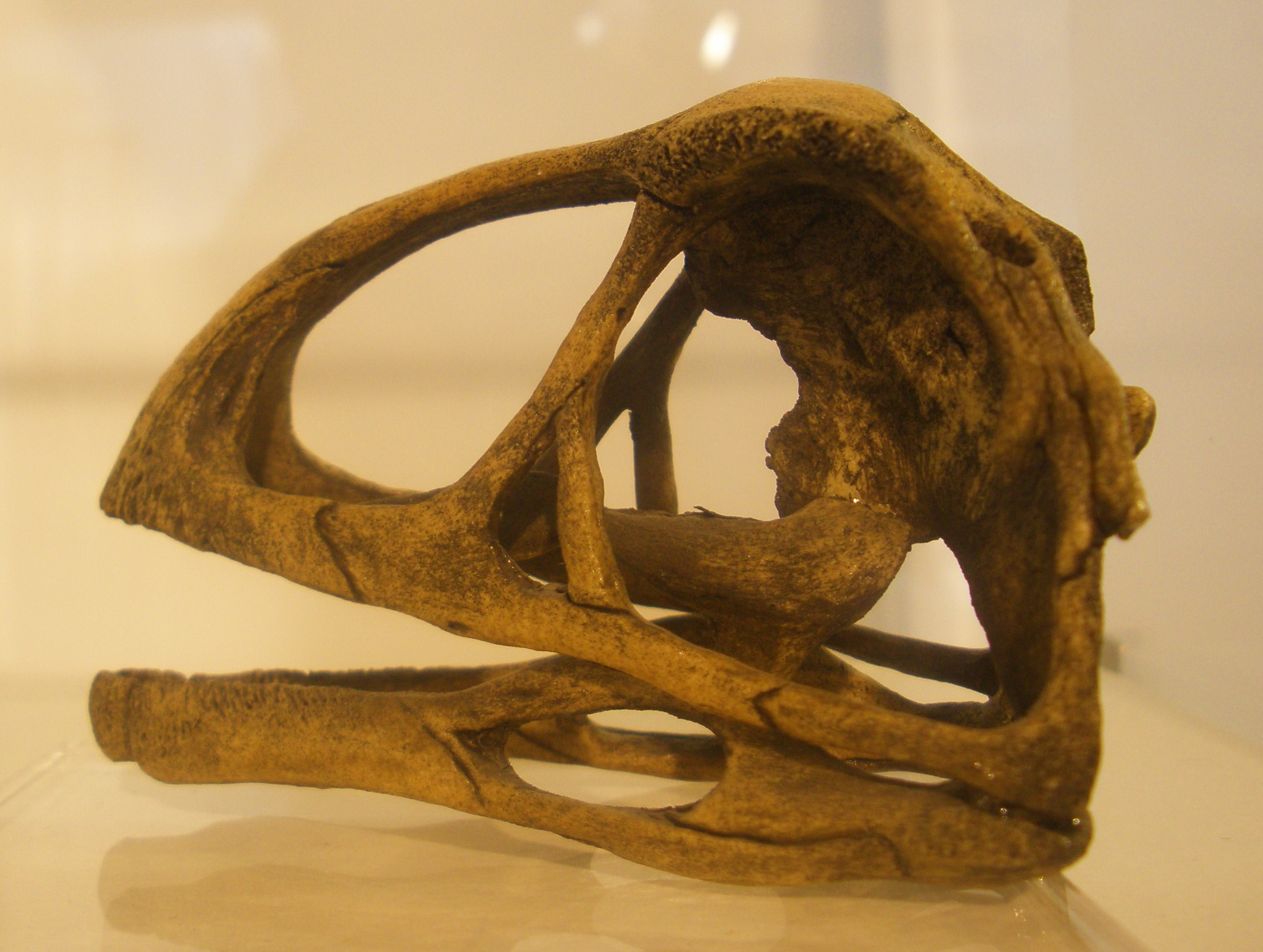 Fossil Avimimus, a theropod